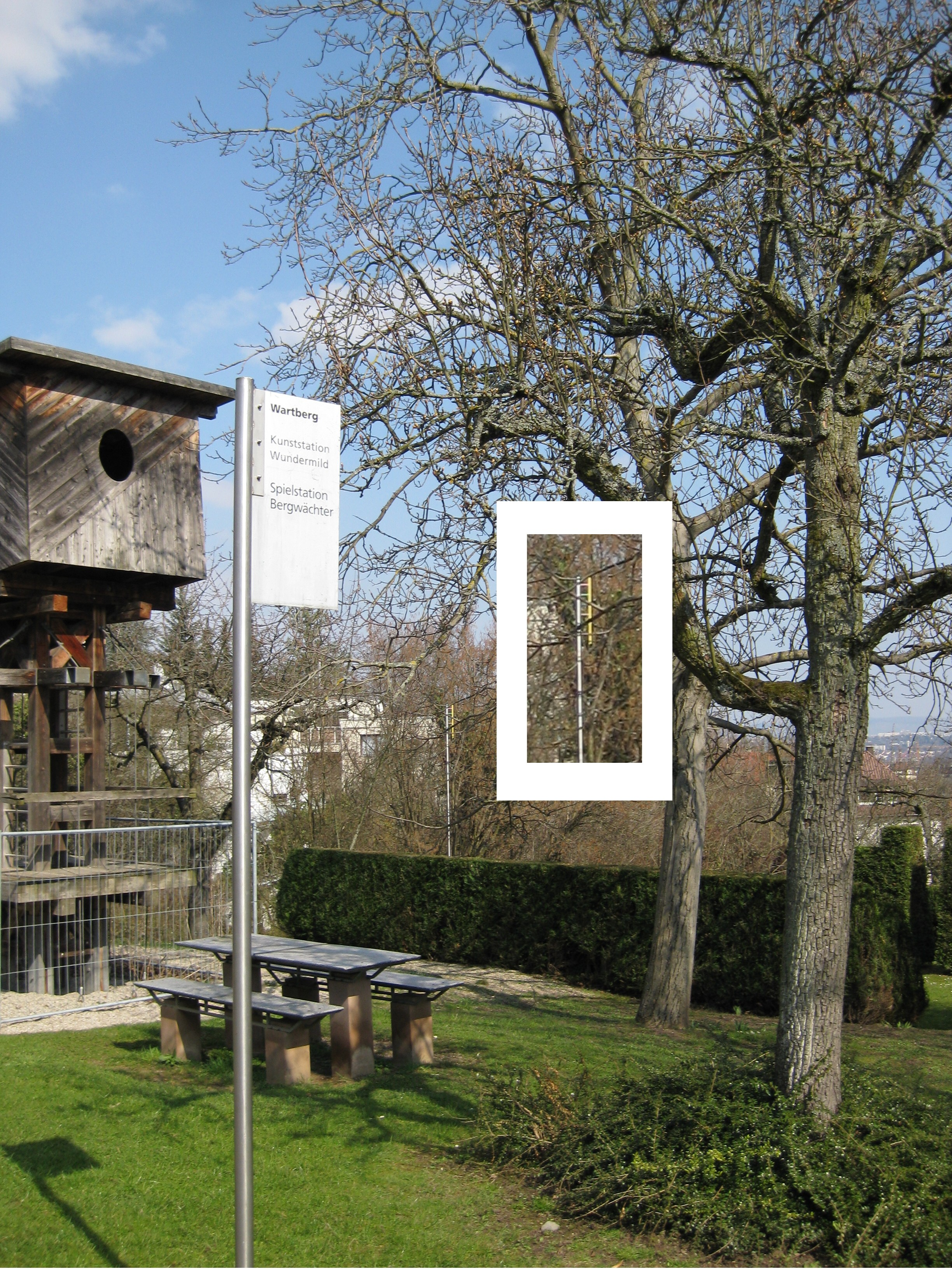 Kunststation Wundermild (mit Ausschnittvergrößerung) und Spielstation Bergwächter (links) auf dem Wartberggelände in Stuttgart.